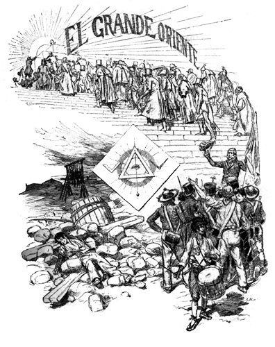 Ilustración de "El Grande Oriente" de Benito Pérez Galdós (La Guirnalda y Episodios Nacionales, 1884)